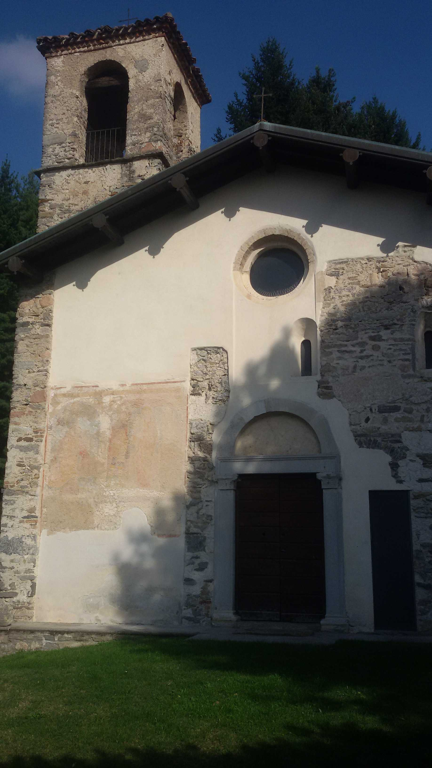 Cappella di San Pietro in Silvis, Induno Olona, Lombardia, sec. XI